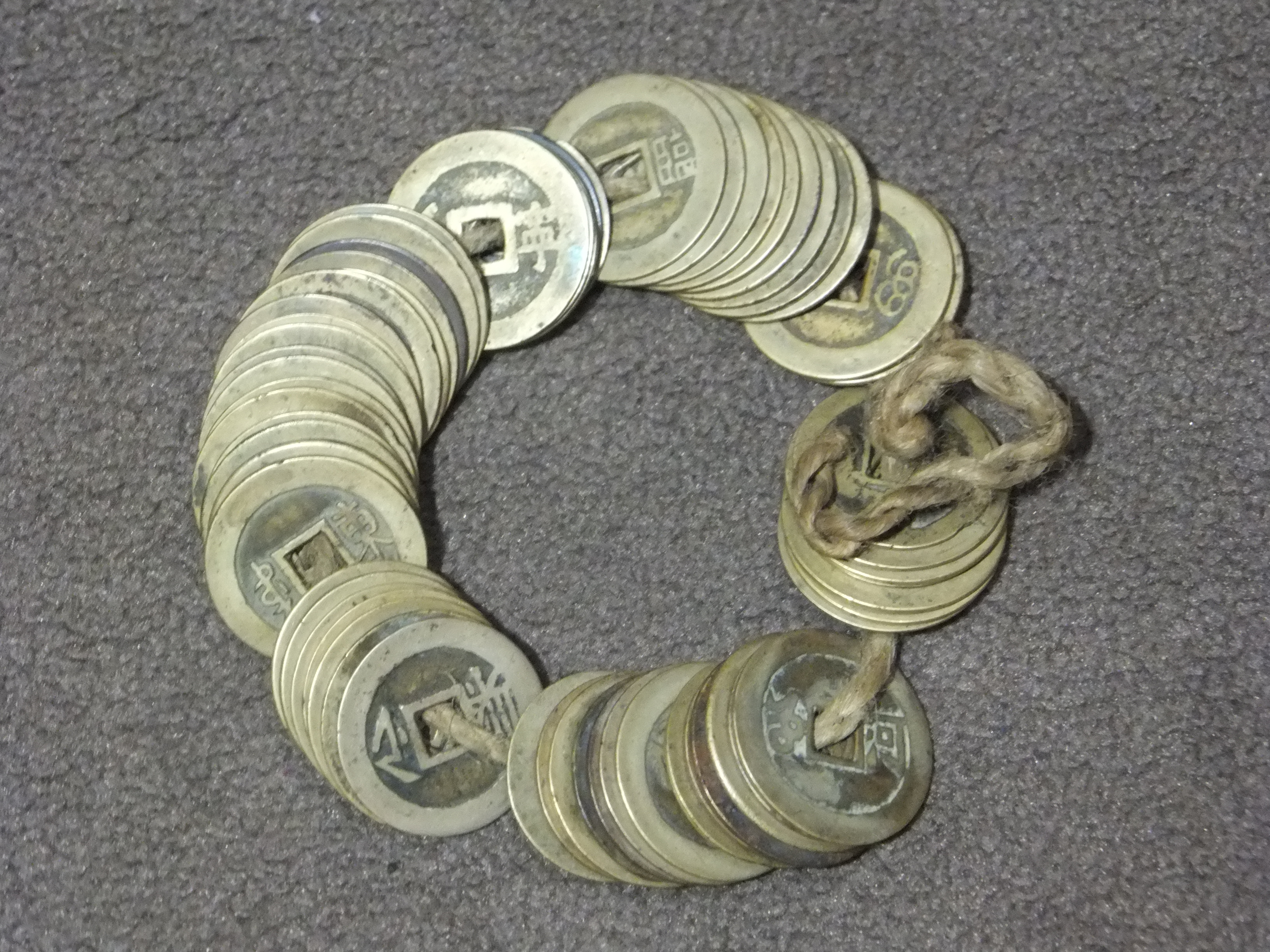 銅錢牌照片